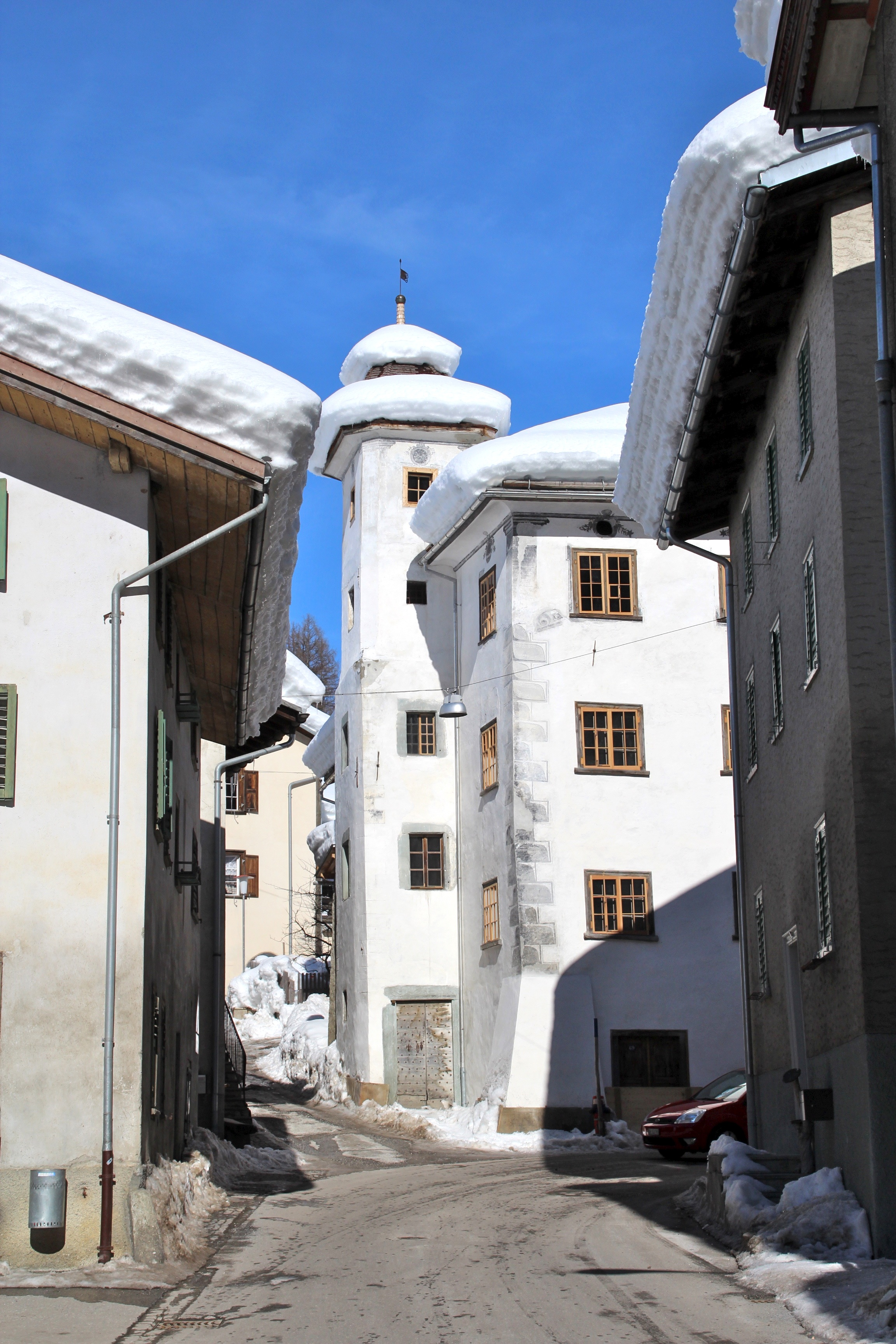 Türalihus Februar 2012